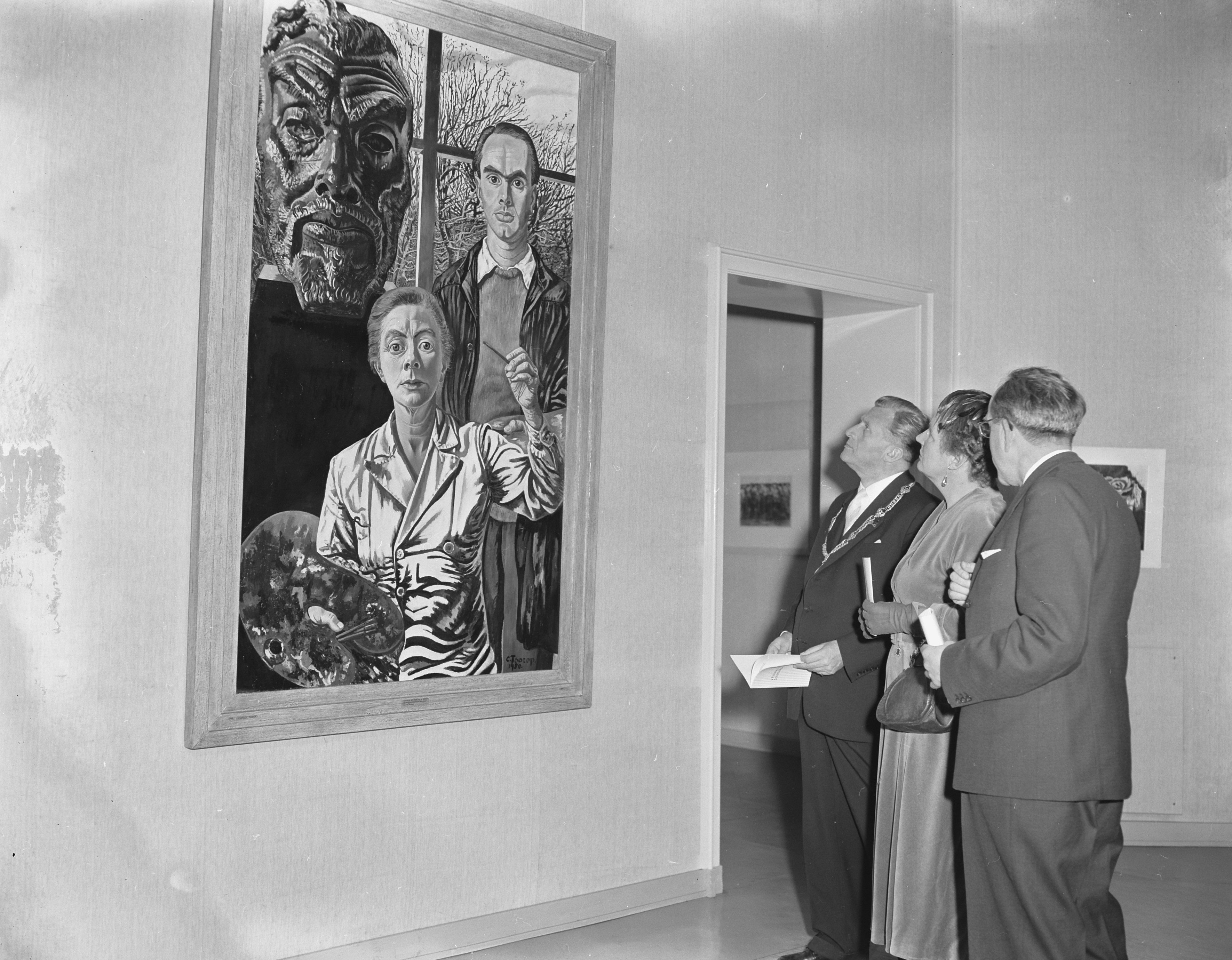 Collectie / Archief : Fotocollectie Anefo Reportage / Serie : Werkbezoek koningin Juliana aan Arnhem Beschrijving : Tentoonstelling "vrouwen schilderen" in Gemeentemuseum Annotatie : Koningin Juliana bekijkt samen met burgemeester Matser en de museumdirecteur A.J. de Lorm het schilderij "Drie generaties" van Charley Toorop Datum : 23 november 1955 Locatie : Arnhem, Gelderland Trefwoorden : bezoeken, koninginnen, koninklijk huis, musea, openingen, tentoonstellingen Persoonsnaam : Juliana (koningin Nederland) Fotograaf : Pot, Harry / Anefo Auteursrechthebbende : Nationaal Archief Materiaalsoort : Negatief (zwart/wit) Nummer archiefinventaris : bekijk toegang 2.24.01.04 Bestanddeelnummer : 907-4526